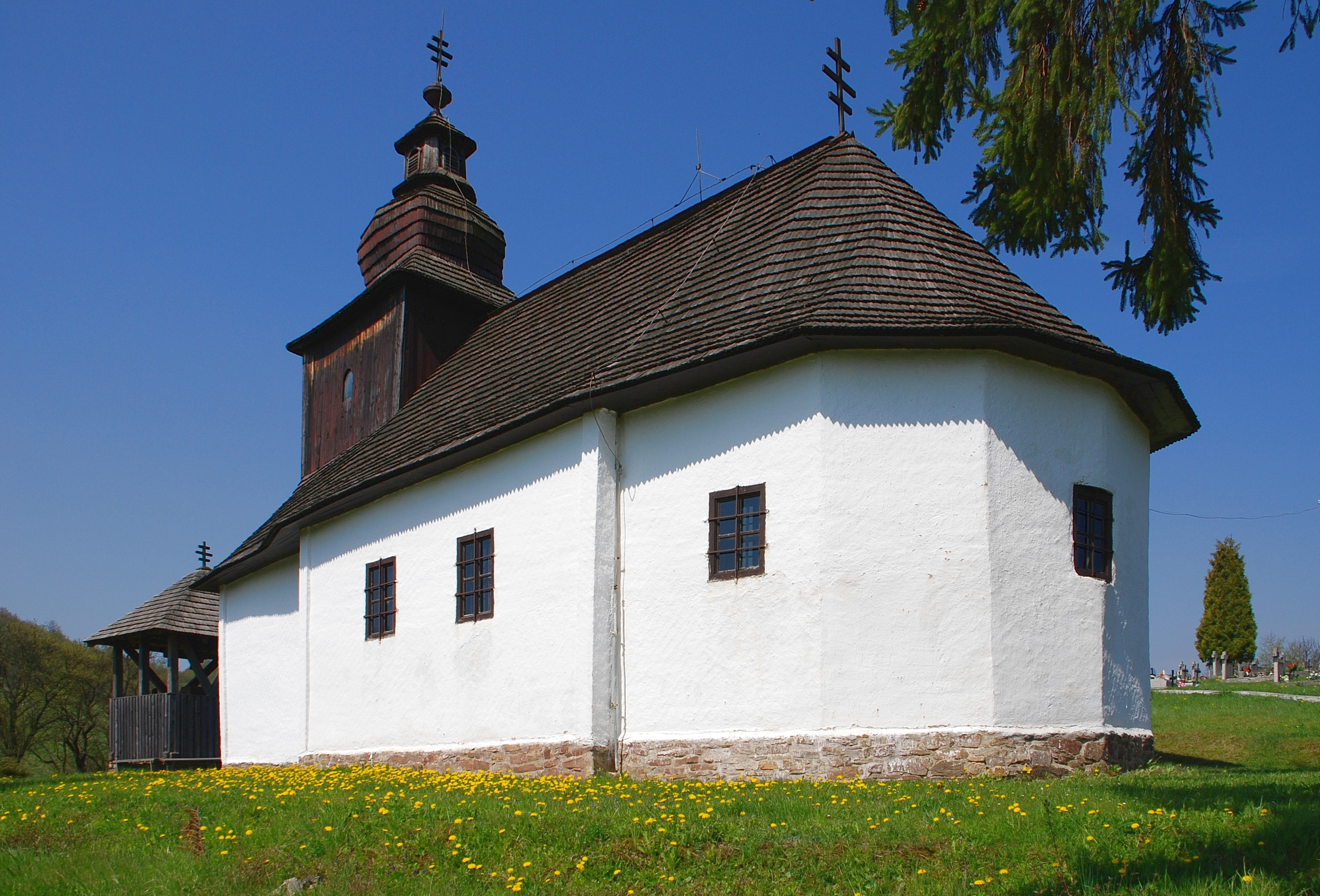 cerkiew